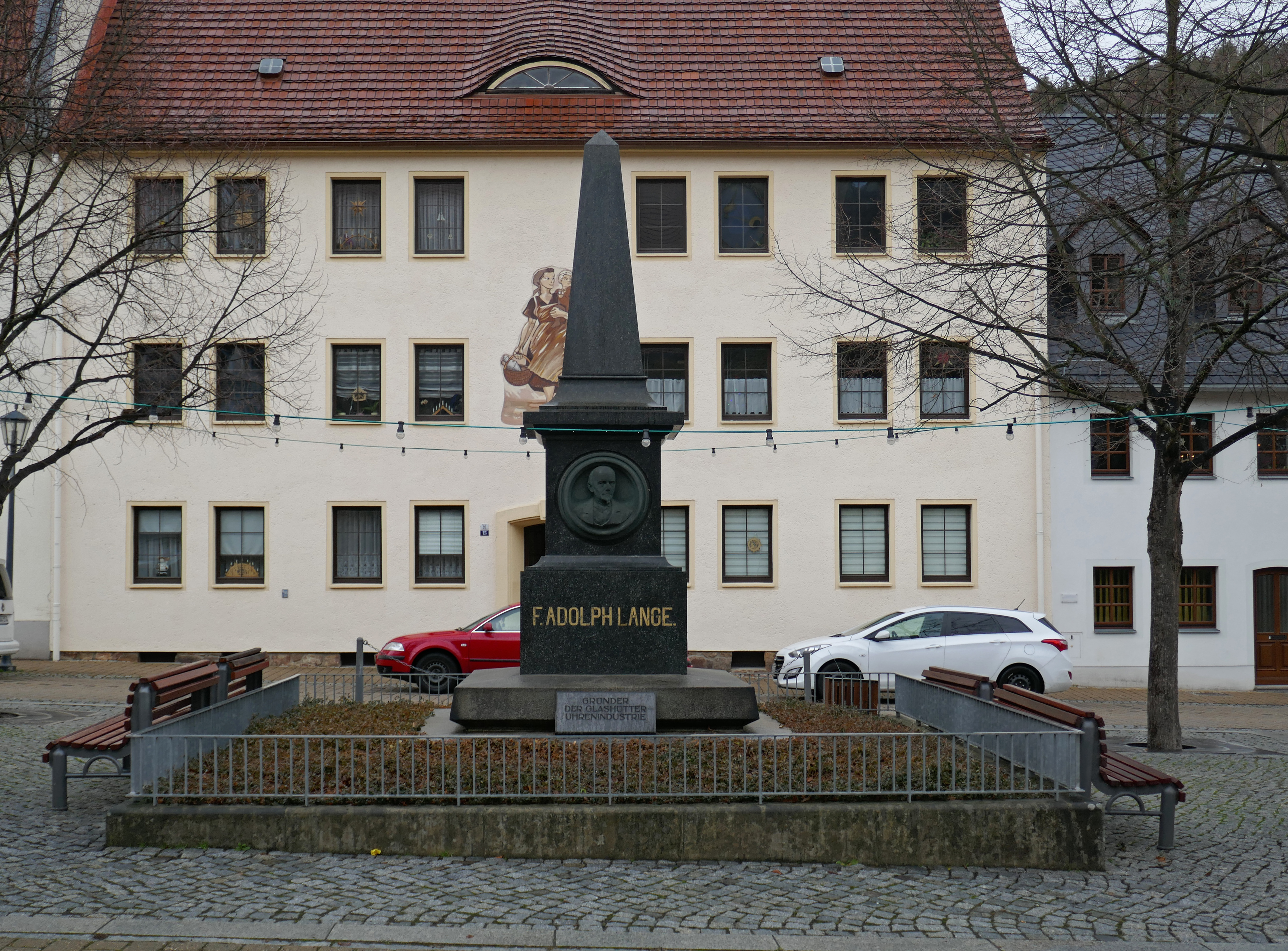 Denkmal für Ferdinand Adolph Lange in Glashütte im Osterzgebirge, Sachsen.